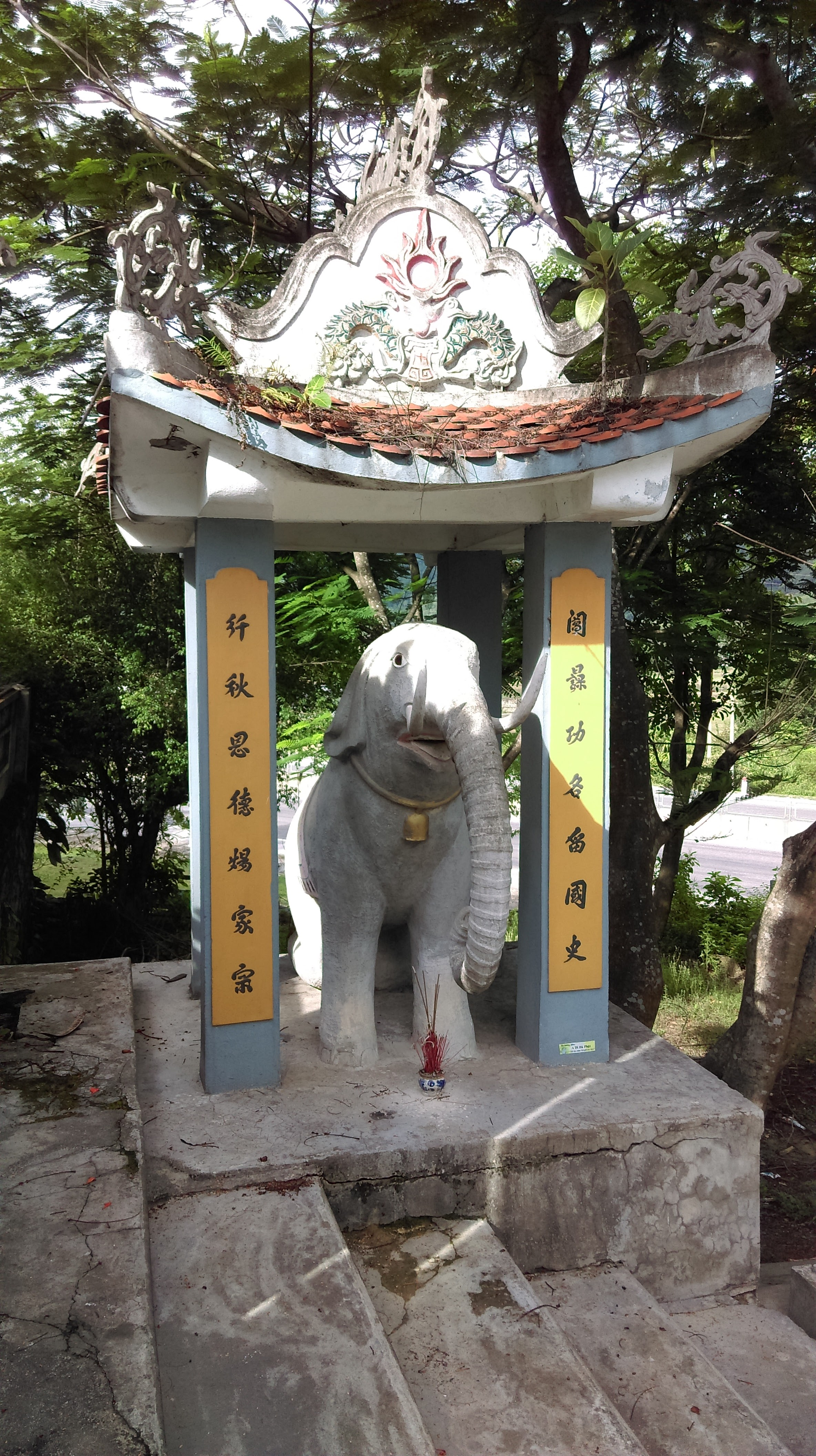 Đền thờ Bùi Cầm Hổ 3